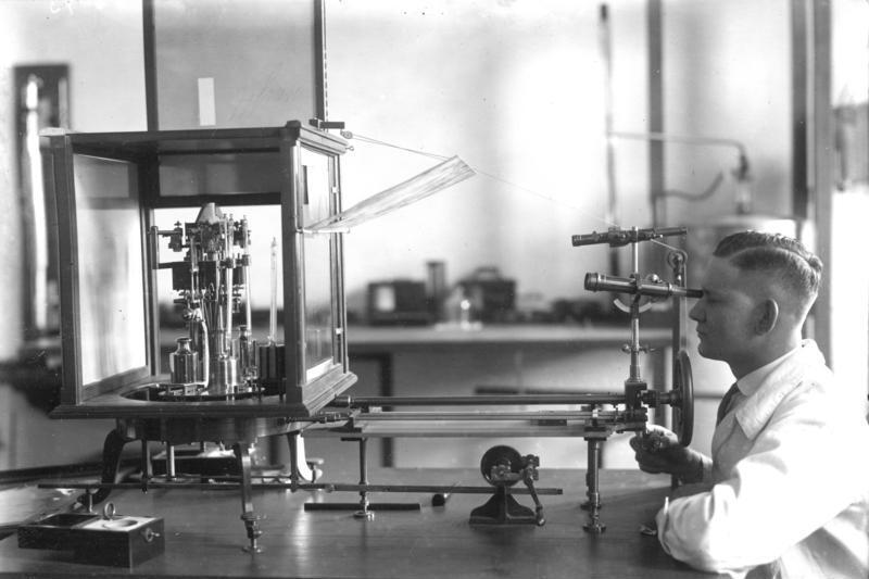 Aus der deutschen Reichsanstalt für Maas und Gewicht! Die Reichsanstalt für Maas und Gewicht prüft die Gewichte und Maasse und setzt ihre Norm fest. Dieselben haben in ganz Deutschland Geltung und sind auch verschiedentlich im Auslande massgebend. Die Maasse werden mit feinsten Apparaten bis auf einen Zehntausenstel Millimeter gepüft. Die Gewichtsmessungen werden derartig genau und fein durchgeführt, dass man beispielsweise imstande ist, sogar ein Staubkorn zu wiegen. Die 1kg Waage zur genauen Bestimmung der 1 kg Gewichts. Die Ablesung und Bedienung der Waage erfolgt aus 1 m Entfernung. Im Waagekasten befinden sich 4 Thermometer zur Bestimmung der Lufttemperatur während der Wägung.